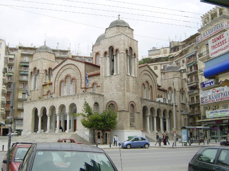 Kirche Panagia Dexia in Thessaloniki Sonstiges: Aktuallisierung der Bilder unter "Thessaloniki"